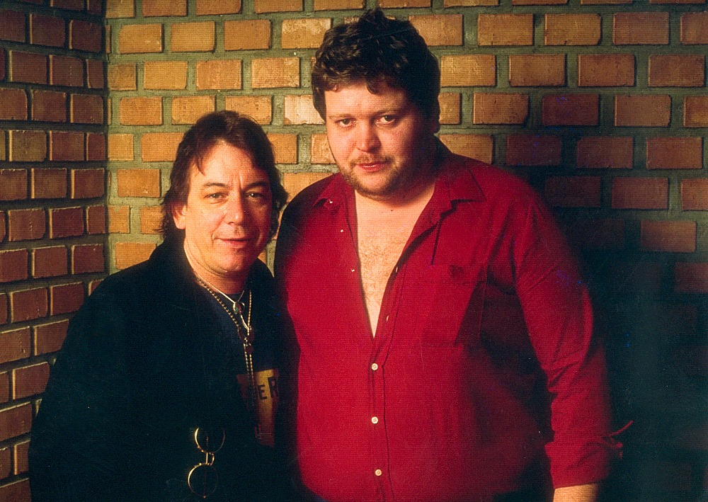 Eric Burdon und Georg Biron im Rockhaus Wien 1984